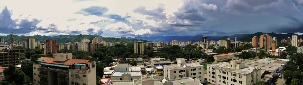 Panorama de Valencia, Venezuela